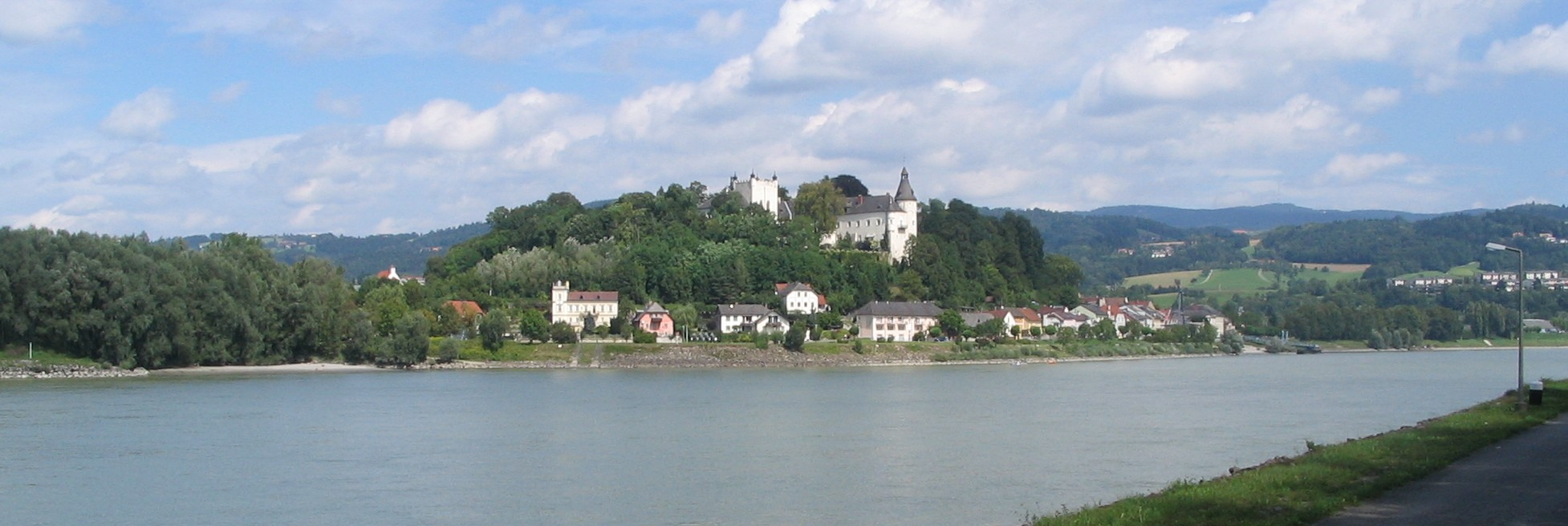 Castle in Ottensheim, Upper Austria